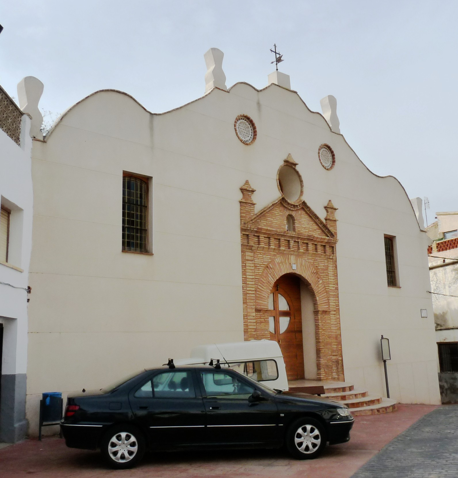 Torrellas - Iglesia de San Martín de Tours - Fachada